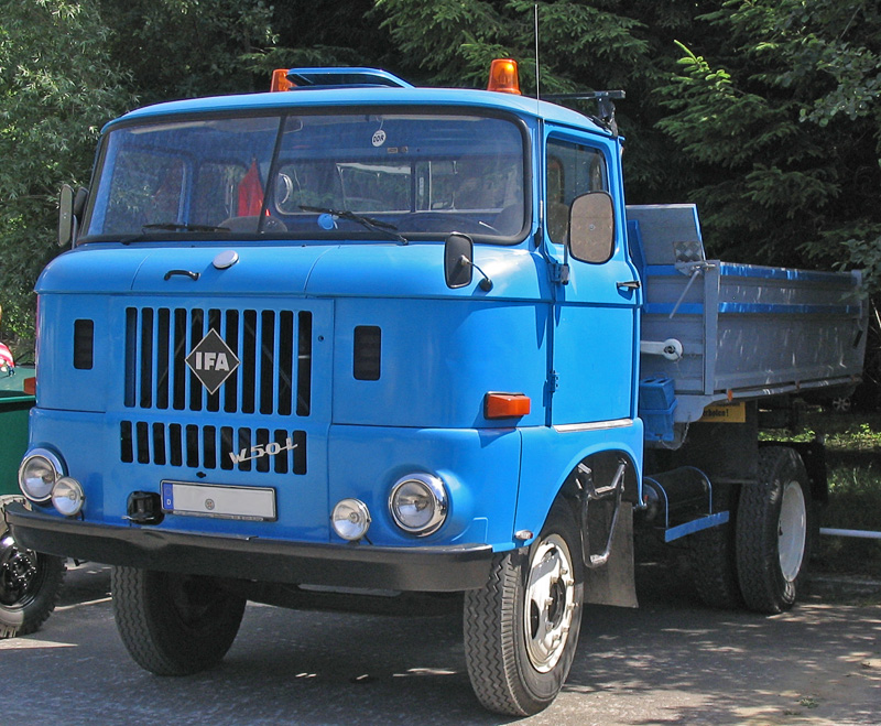 Beschreibung: W 50 L Fotograf: Darkone, 2. Juli 2005